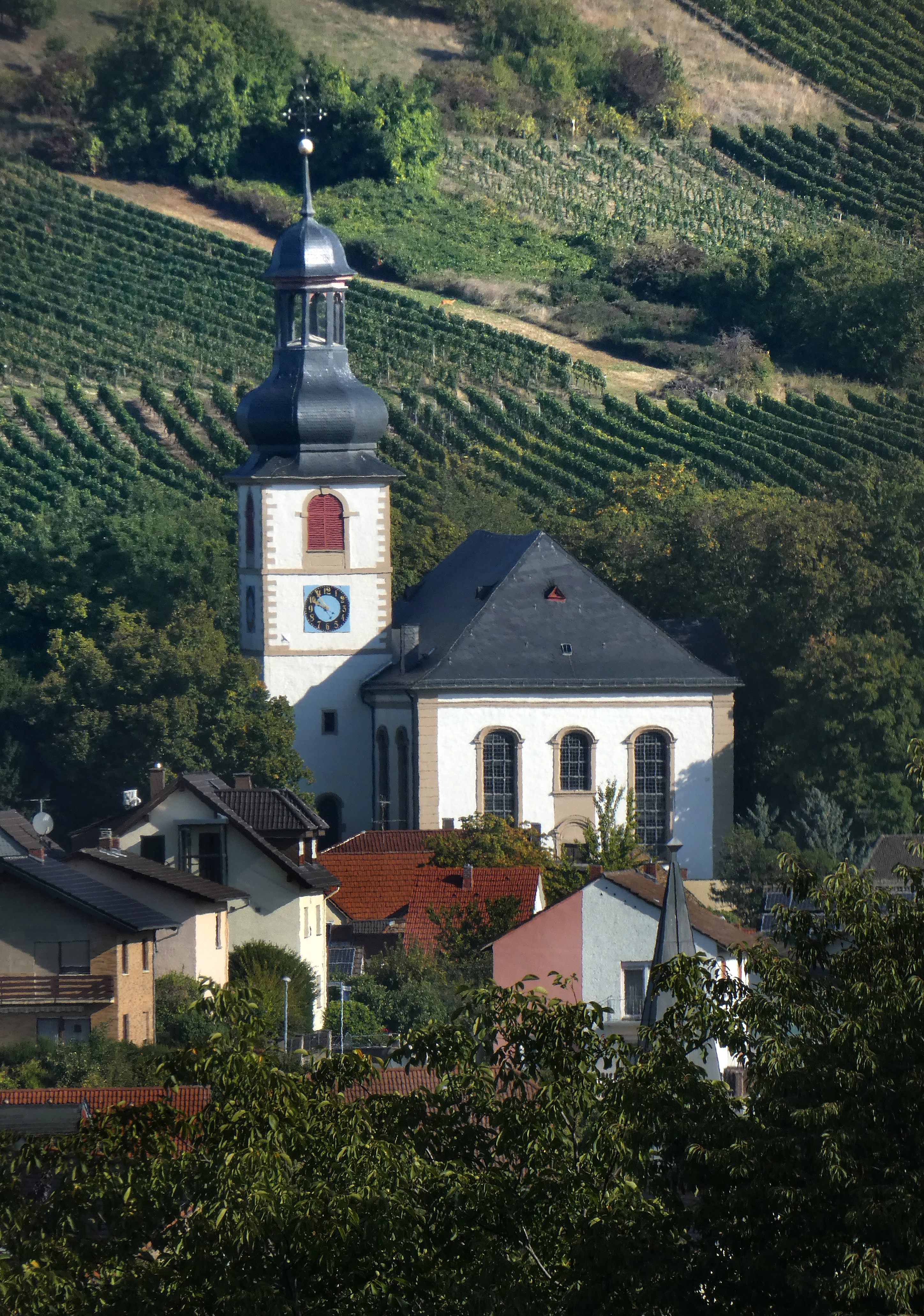 St. Martin in Jugenheim - Rheinhessen